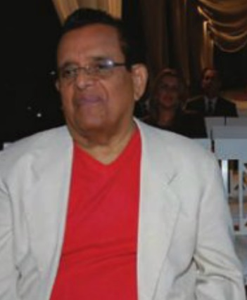 O compositor brasileiro Evaldo Gouveia no Clube do Choro, em Brasília